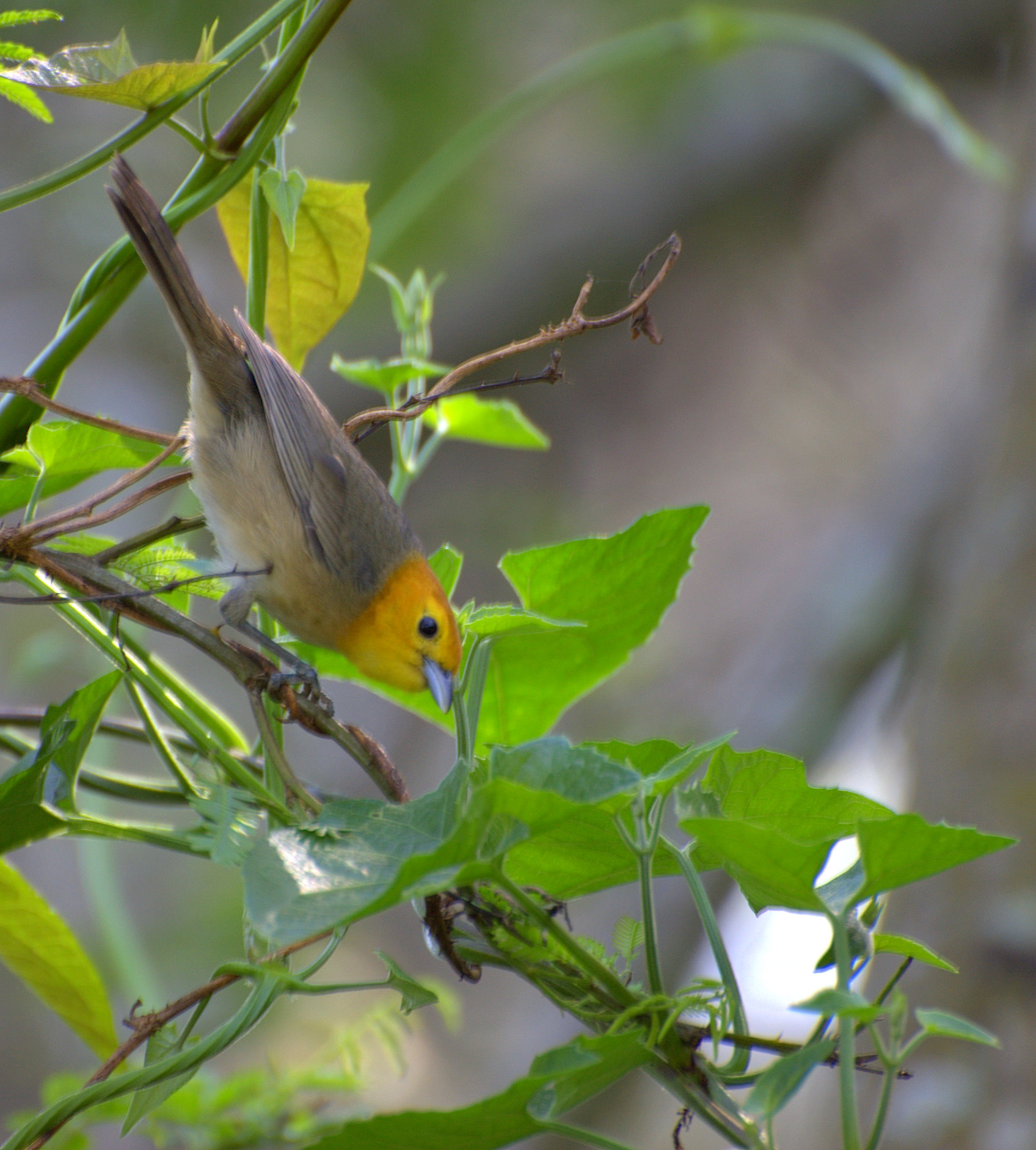 Horto Florestal de São Paulo Orange-headed Tanager (Thlypopsis sordida)